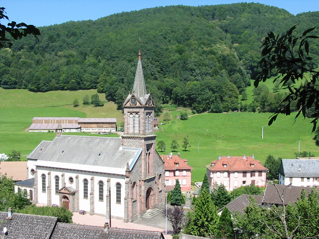 Le village d'Hachimette et son église Sainte-Richarde, commune de Lapoutroie (Haut-Rhin)